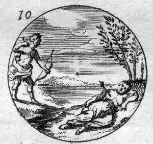 Daniel de La Feuille, Devises et emblemes anciennes et modernes - Apollo and Coronis